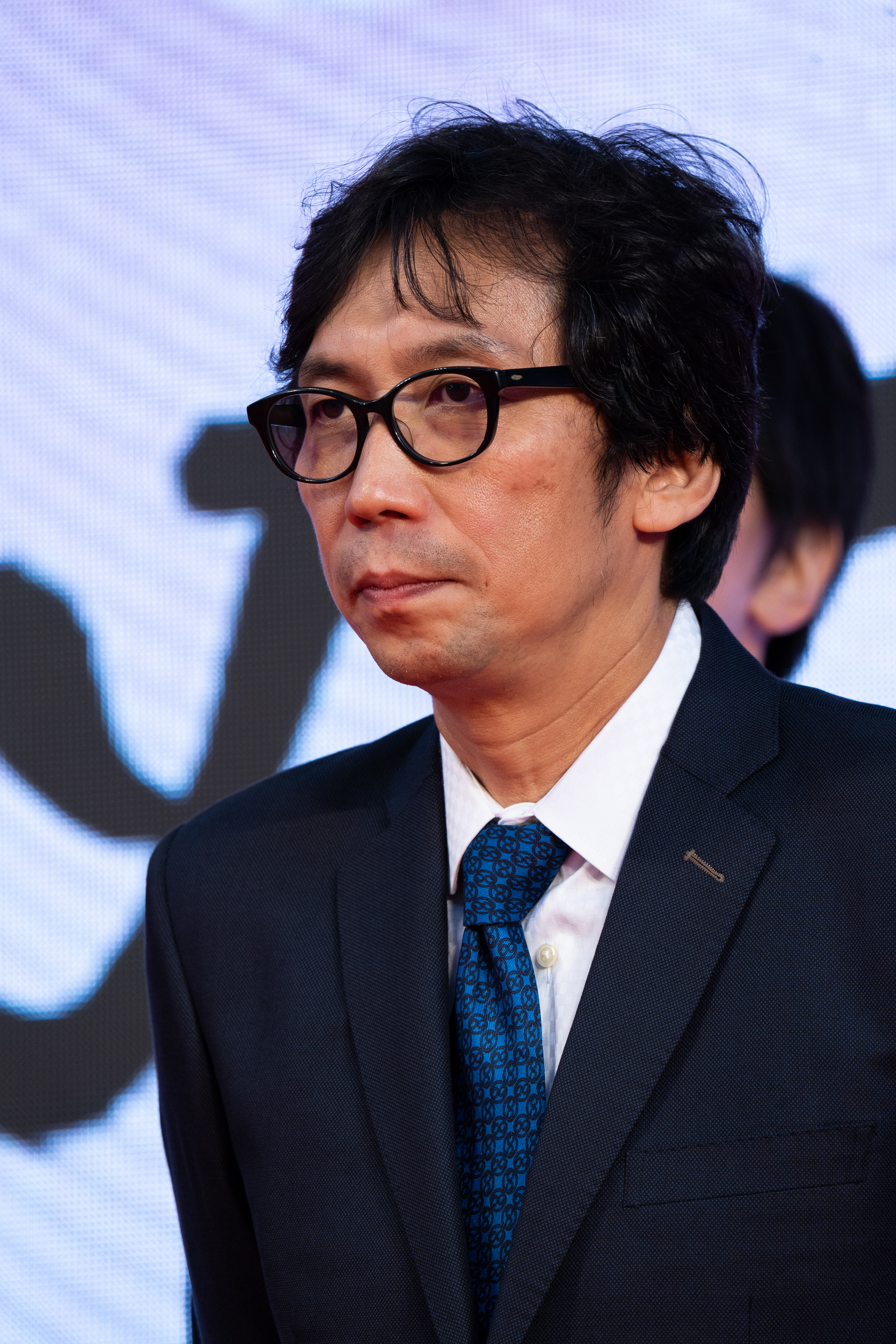 第32回 東京国際映画祭 オープニングセレモニー 行定勲 (その瞬間、僕は泣きたくなった)